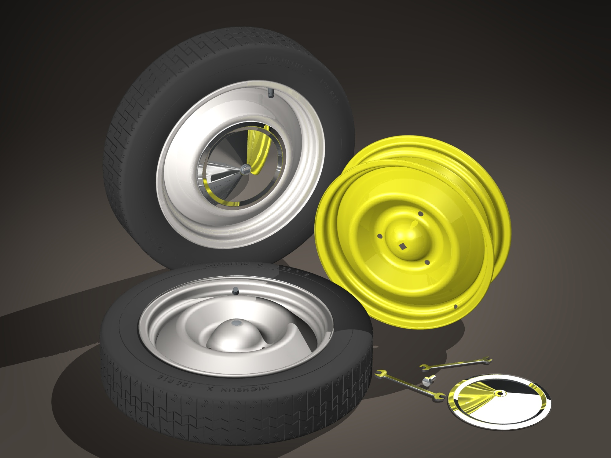 Image de synthèse. Roues de 2CV et modèles dérivés. Réalisée avec SolidWorks